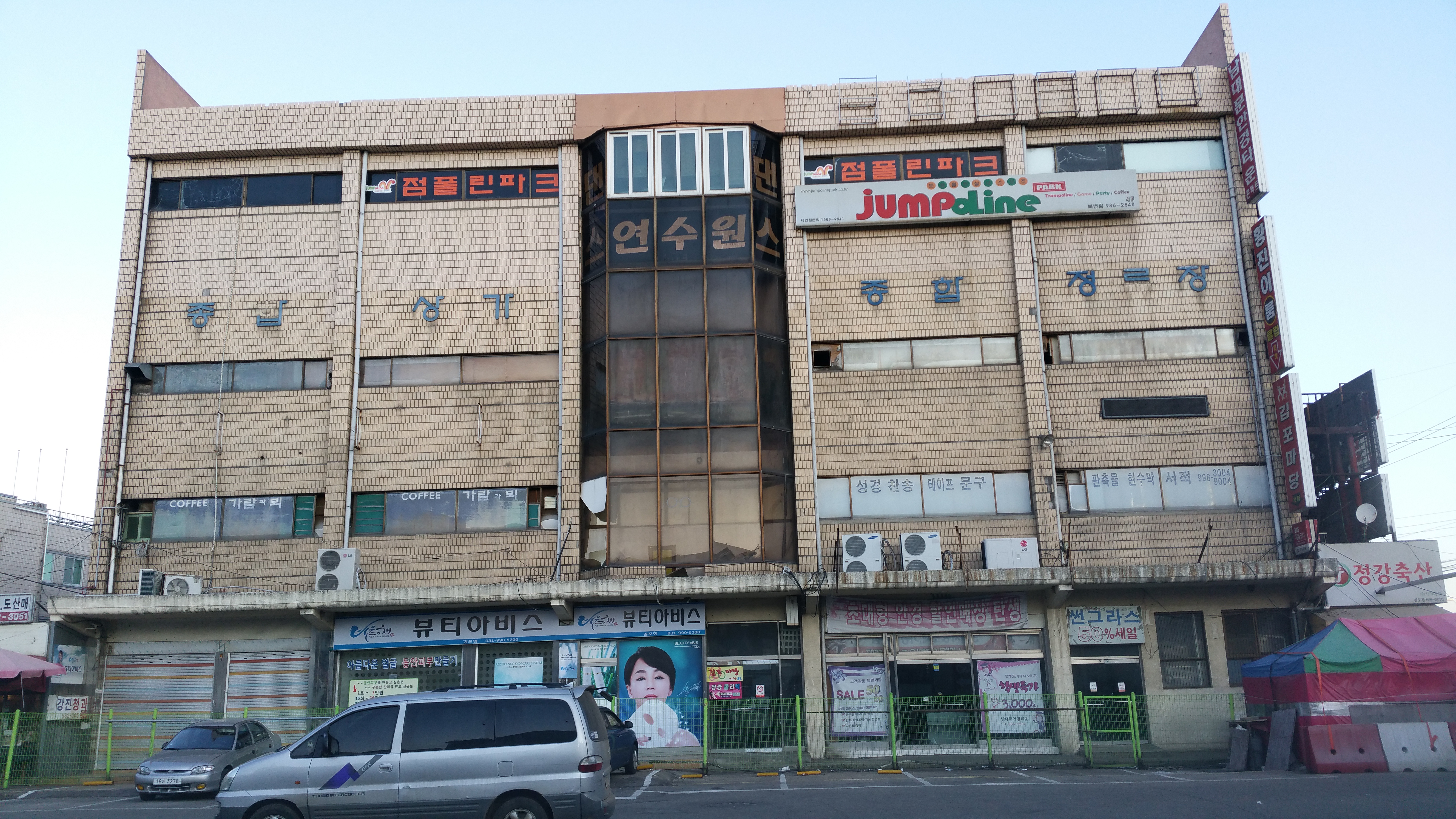 2016년 1월 19일에 촬영된 김포구터미널 건물 모습.